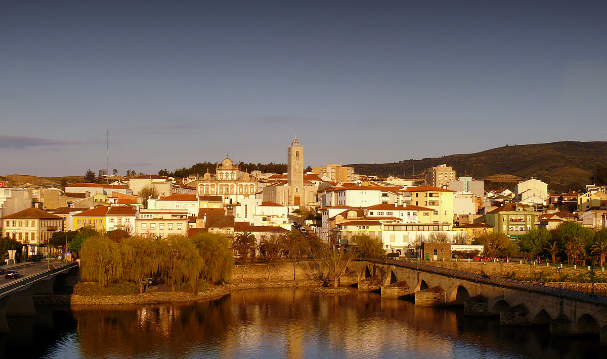 Vista da Ponte antiga de Mirandela This monument is classified as Monumento Nacional. This file was uploaded for Wiki Loves Monuments in Portugal with the unique identifier 70533.